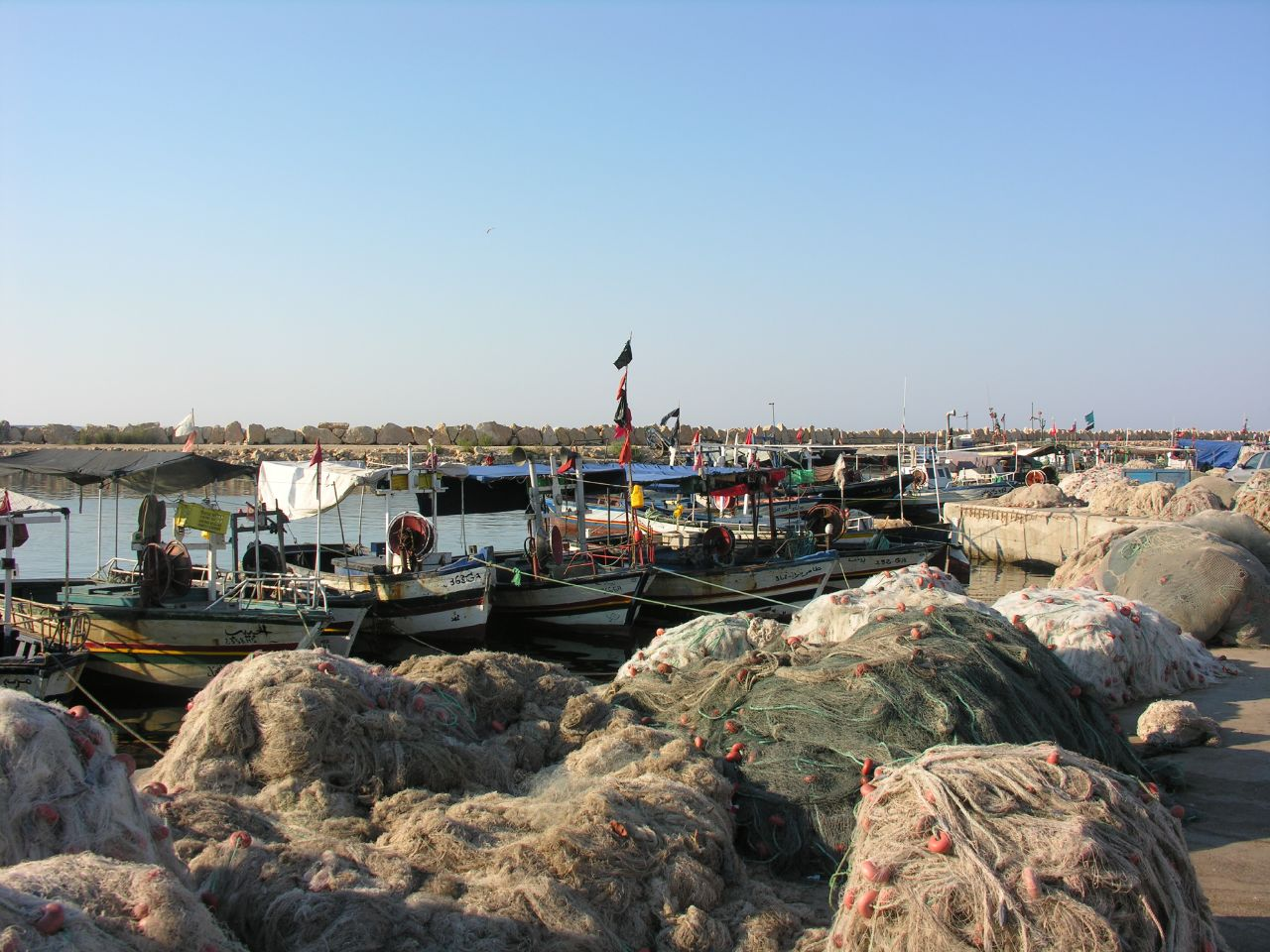 Port de Houmt Souk Djerba Tunisie